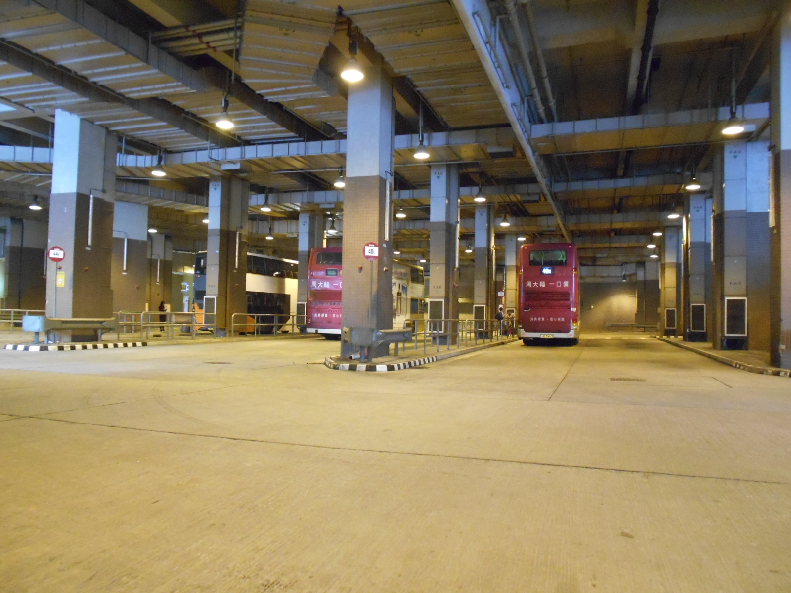 中文（香港）: 葵涌邨巴士總站(2016年)